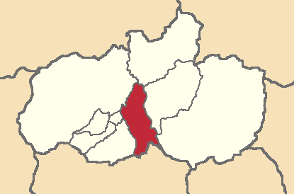 Mapa localizador del cantón en Tungurahua, Ecuador